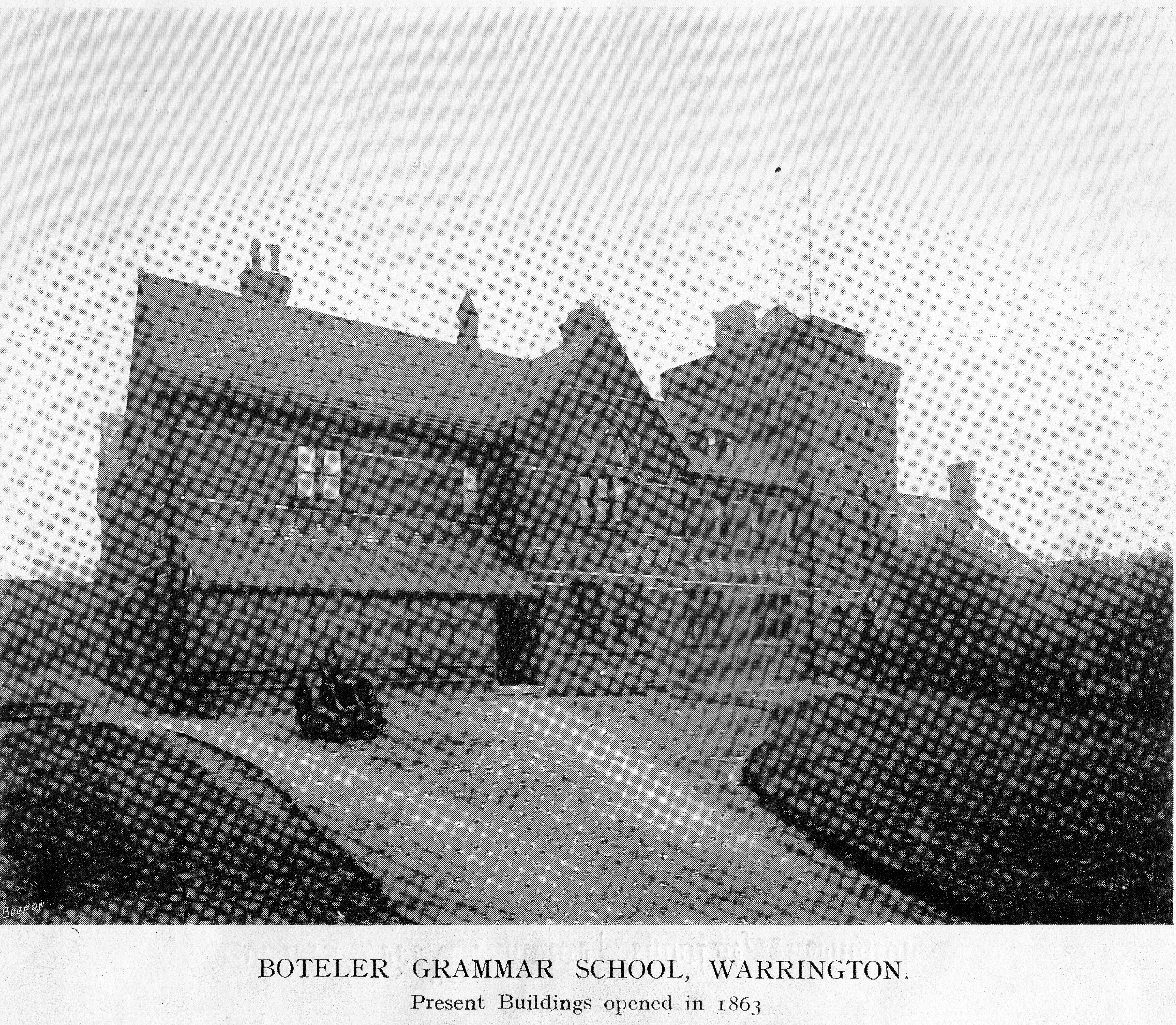 Boteler Grammar School Warrington